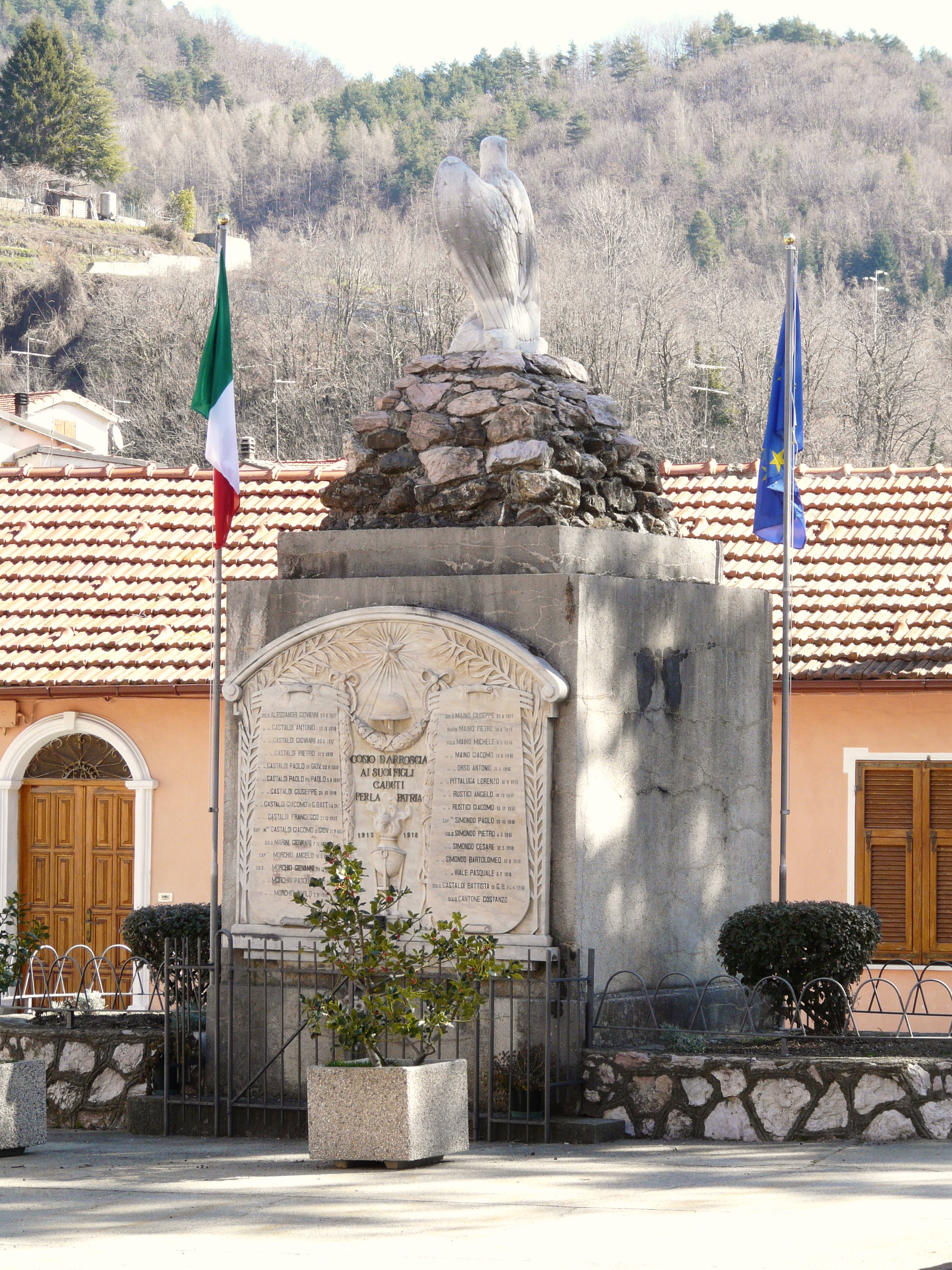 Monumento ai caduti, Cosio di Arroscia, Liguria, Italia